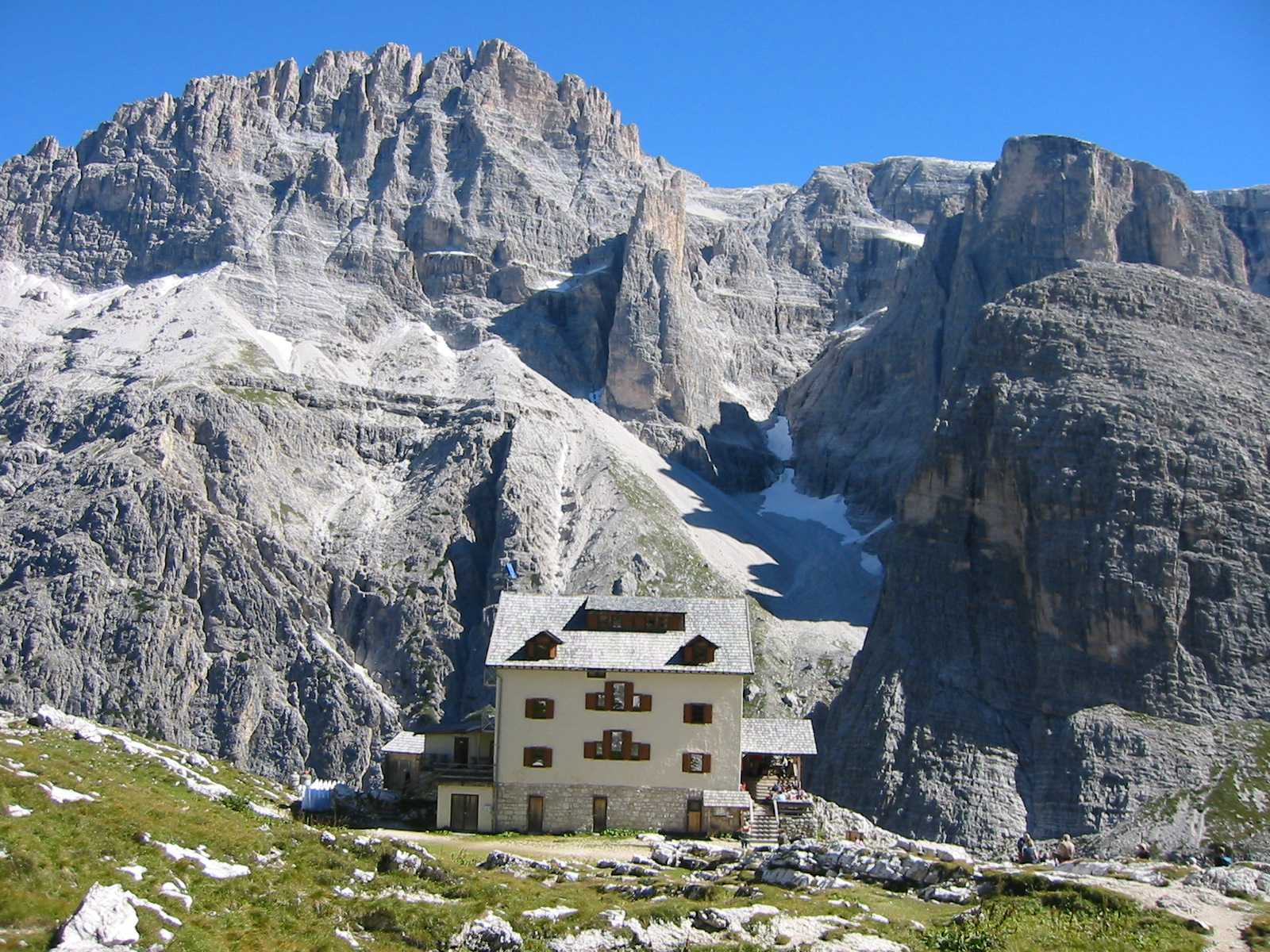 Foto scattata in settembre 2004 da Fantasy :-)